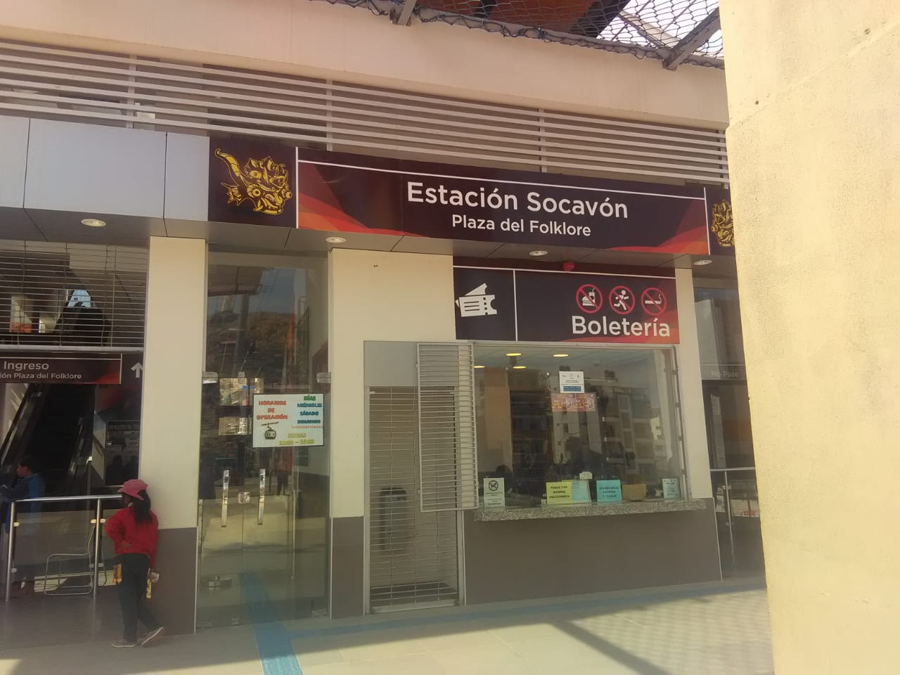 EstacionSocavon